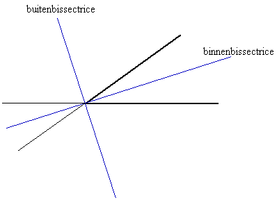 binnen- en buitenbissectrice (eigen illustratie)